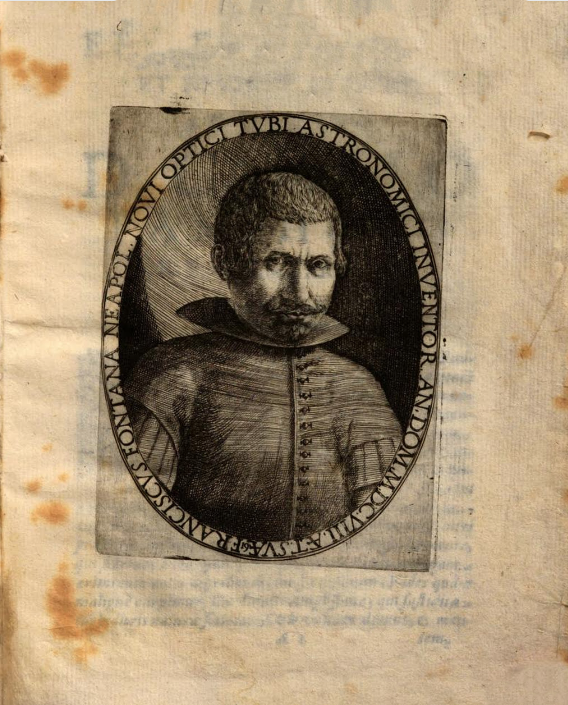 Ritratto di Francesco Fontana